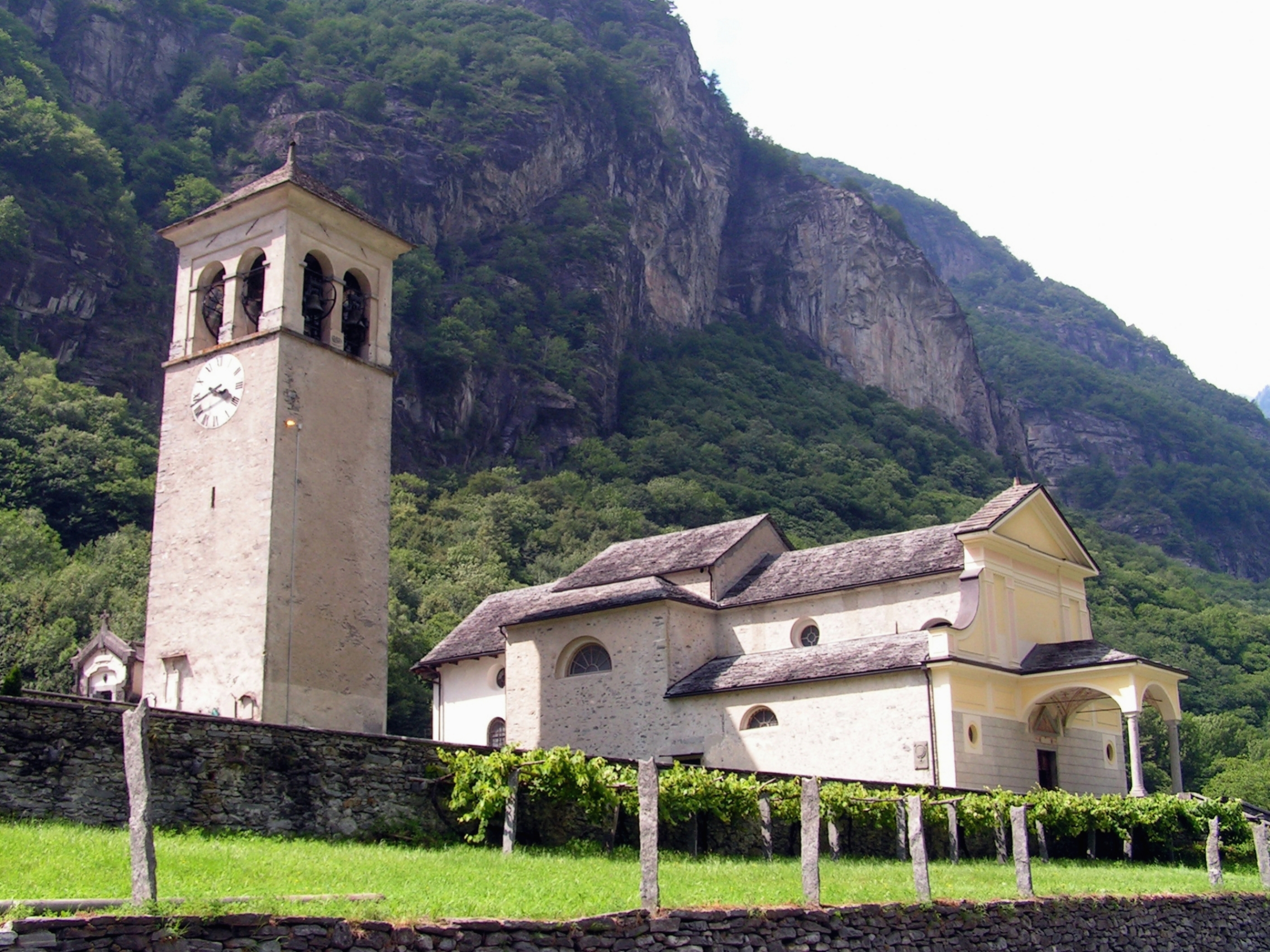 Cevio vecchia 16, Cevio. Église de San Giovanni Battista.